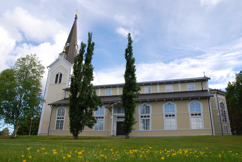 Sweden's largest wooden church, located in Stensele./Sveriges största träkyrka, belägen i Stensele